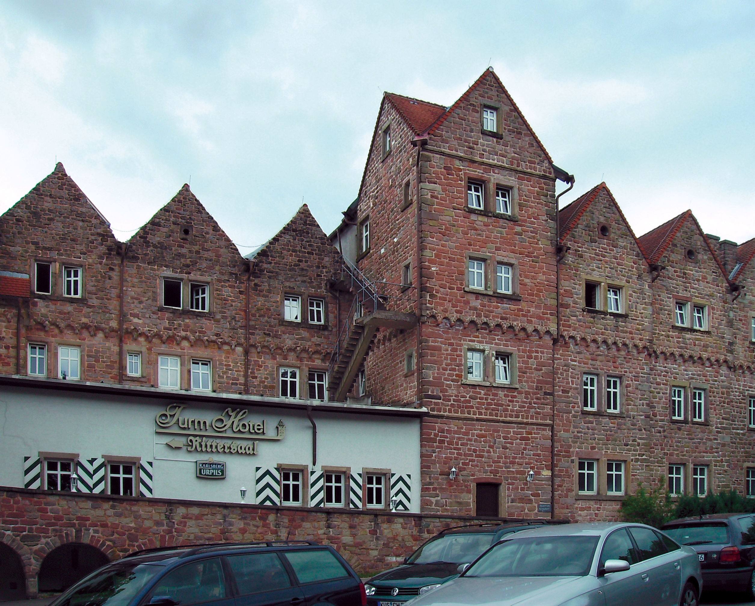 Potzberg: "Schloss" mit Hotel-Restaurant Licensing thumb|Original Uploaded with Reworkhelper thumb|Original Uploaded with Reworkhelper